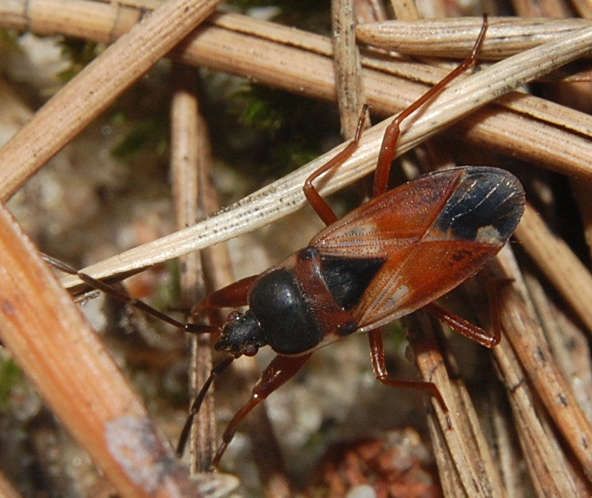 Eremocoris abietis (Lygaeidae). Grunewald, Lieper Bucht, Berlin, Deutschland